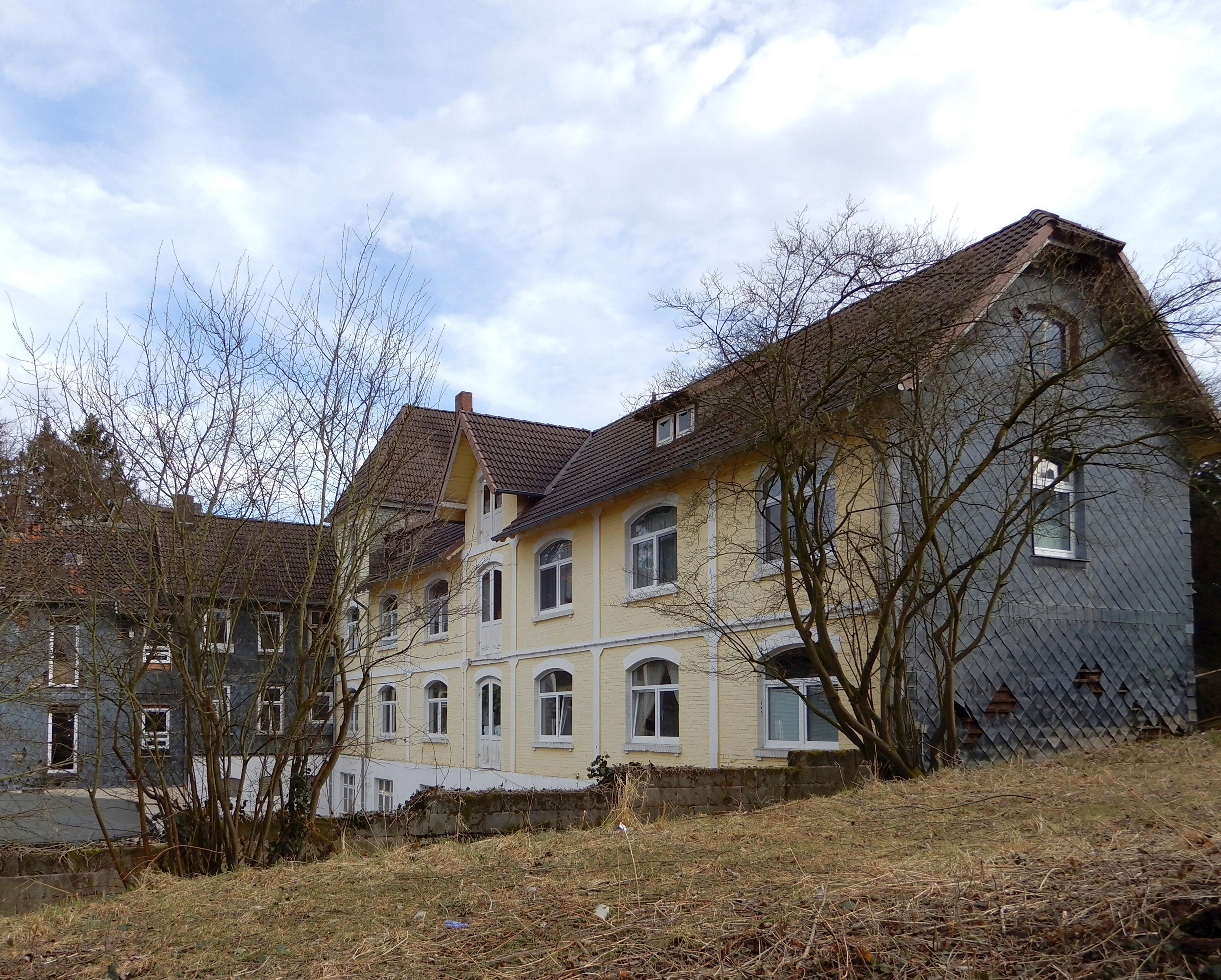 Gebäude Am Südbahnhof 22-24 in Osterode am Harz, ehemalige Fabrik Schumacher & Co..